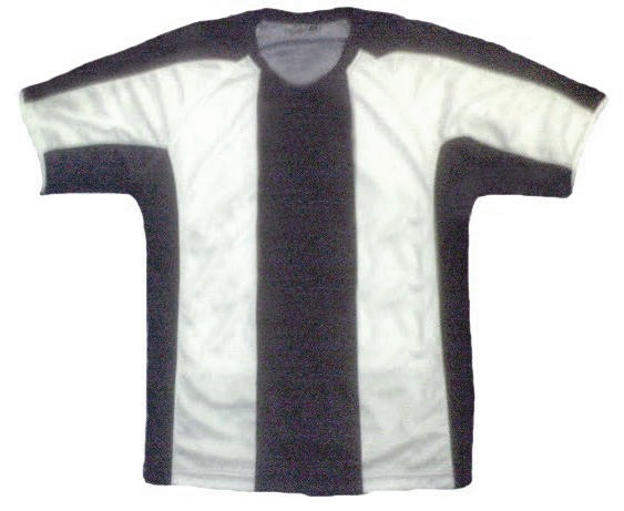 Diseño de la camiseta de Alianza Lima.